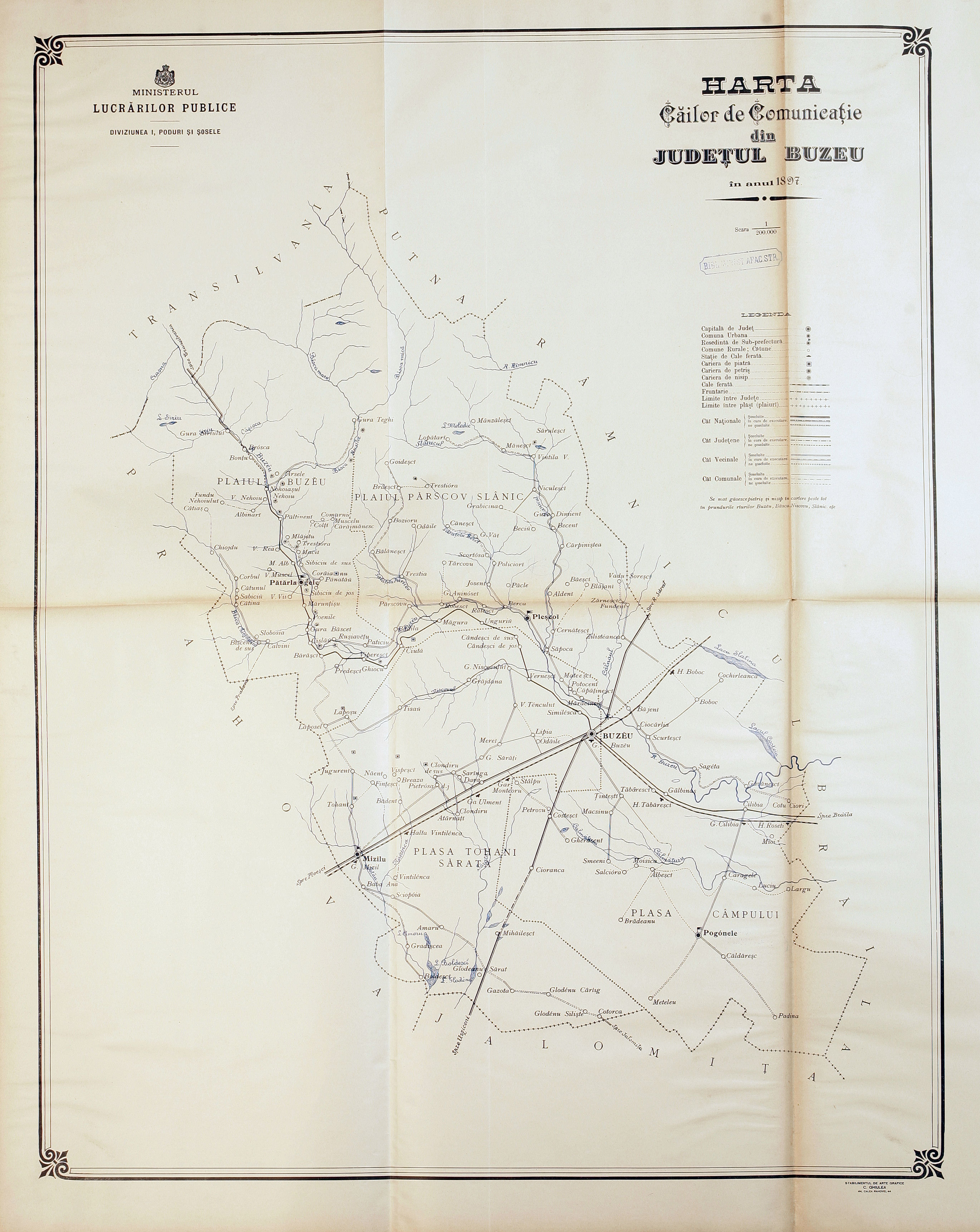 Atlasul Căilor de Comunicații (1897) - județul Buzău